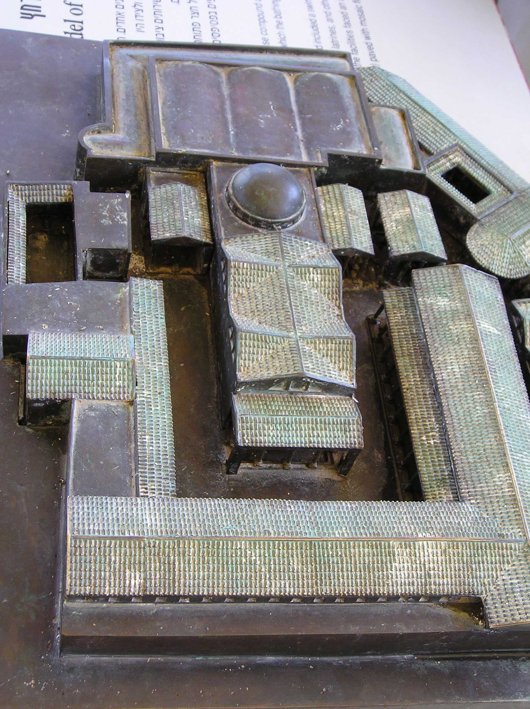 Bet Szean (stanowisko archeologiczne - Scytopolis) w Izraelu. Metalowy model łaźni bizantyjskiej.